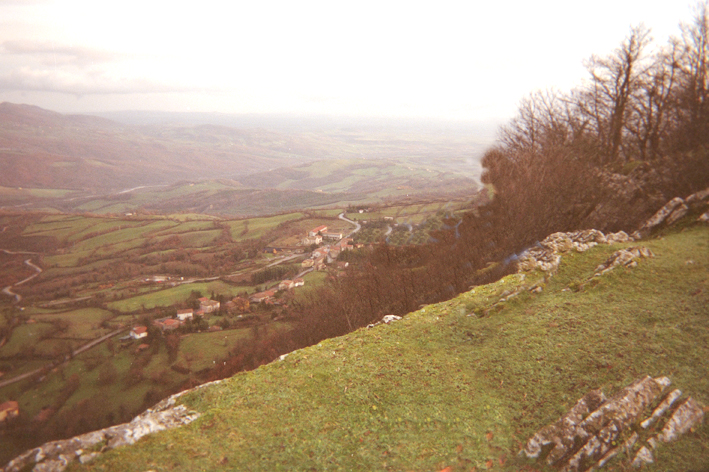 Panorama del paese di Cellena e dell'alto Lazio visto dal massiccio della Ripa